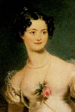 Portrait der Henriette von Nassau-Weilburg (1797-1829). Am 17. September 1815 heiratete sie als 18-Jährige in Weilburg den 44-jährigen „Sieger der Schlacht bei Aspern“, Erzherzog Karl von Österreich-Teschen (1771-1849), der 26 Jahre älter war. Dies war die erste „Mischehe“ (Calvinismus) im katholischen Haus Habsburg; es wurde eine glückliche Ehe, die 14 Jahre bestand und aus der sieben Kinder hervorgingen. Sie wurde nur 32 Jahre alt.